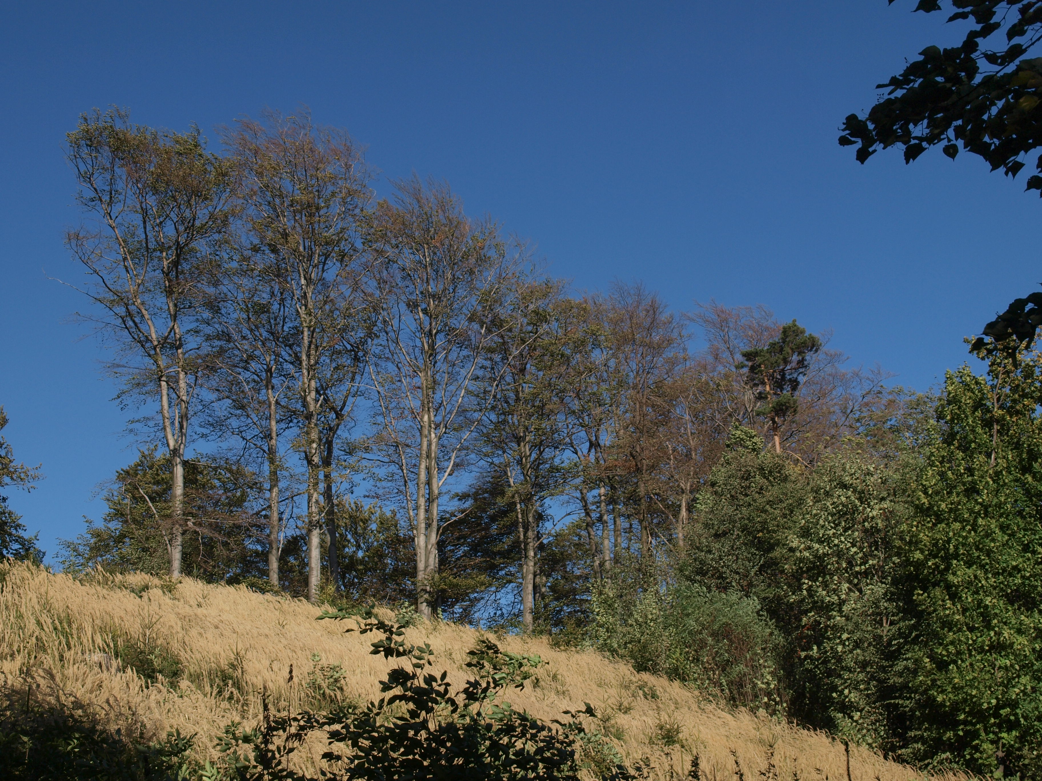 dopad sucha na buk; obrázek vznikl pro potřeby ČHMÚ dokumentovat sucho r. 2015